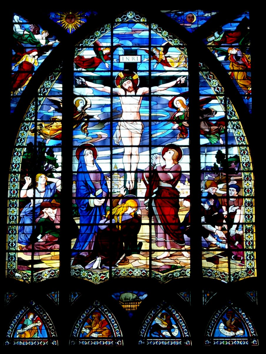 Vitrail central du chœur de l'église Saint-Jean de Montmartre de Léon Tournel